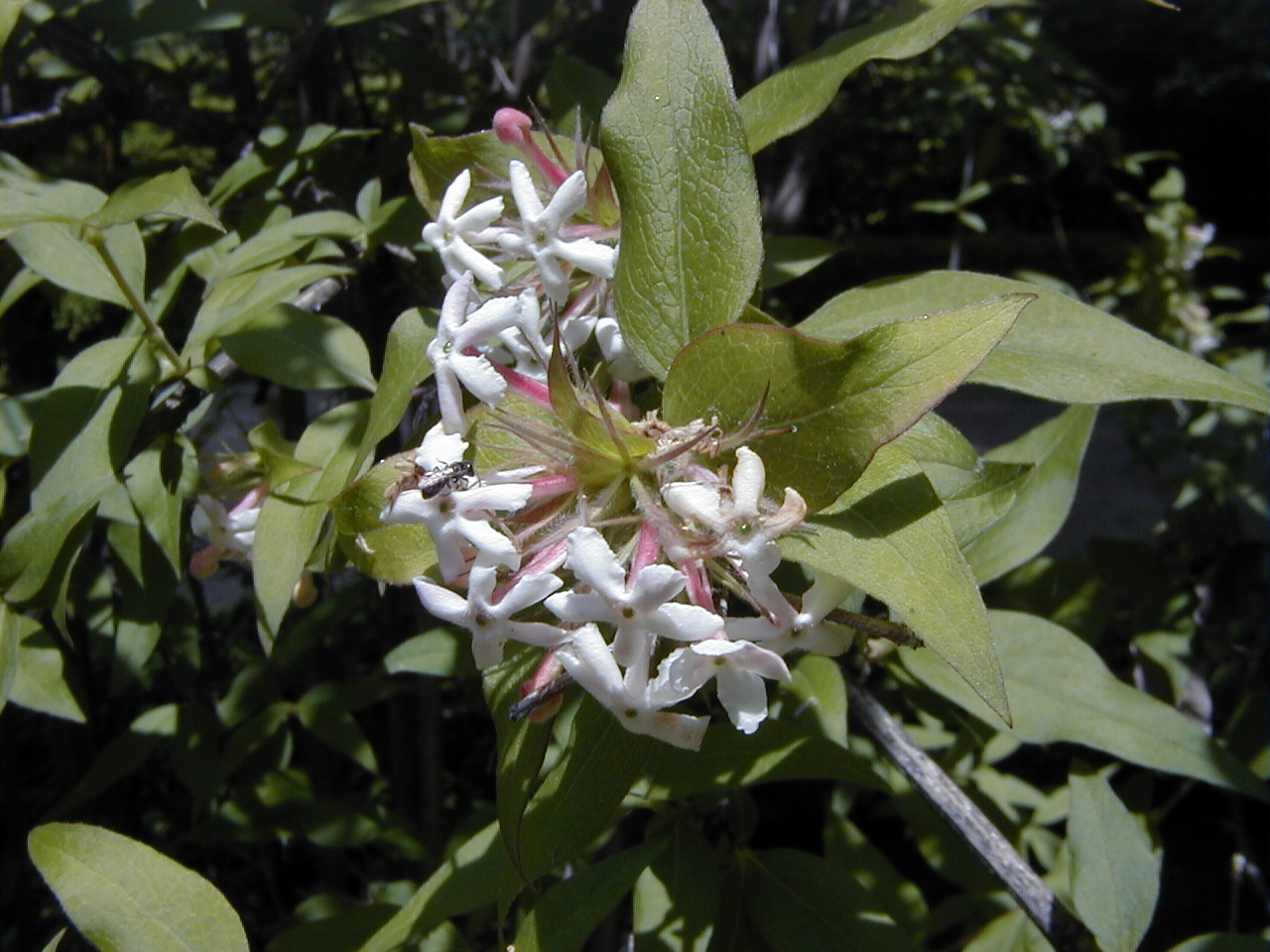 Abelia triflora. Real Jardín Botánico de Madrid.